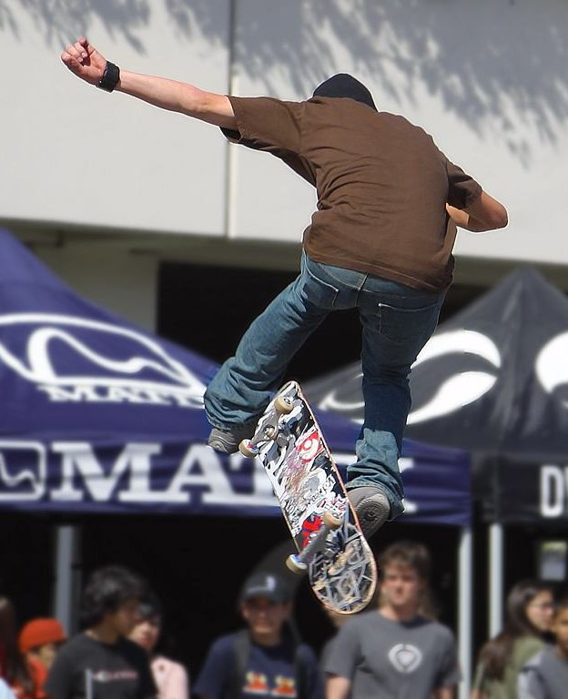 Skateboard-Trick ( Oli-Impossible )